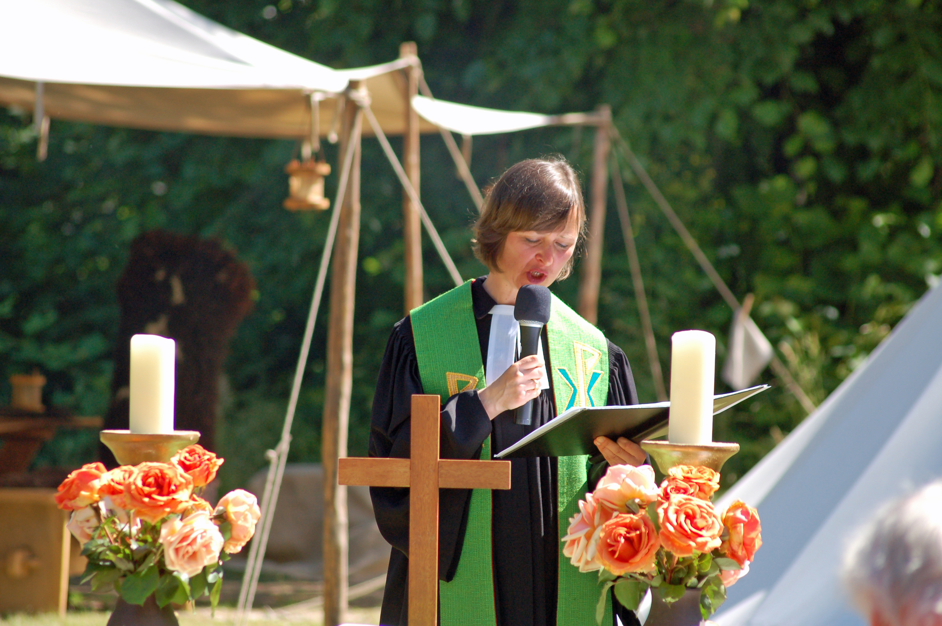 Pastorin Kirsten Rowoldt beim Gottesdienst zum mittelalterlichen Markttreyben zu Ueterst End auf dem historischen Burgplatz der ehemaligen Burg der Ritter von Barmstede auf dem Klostergelände.